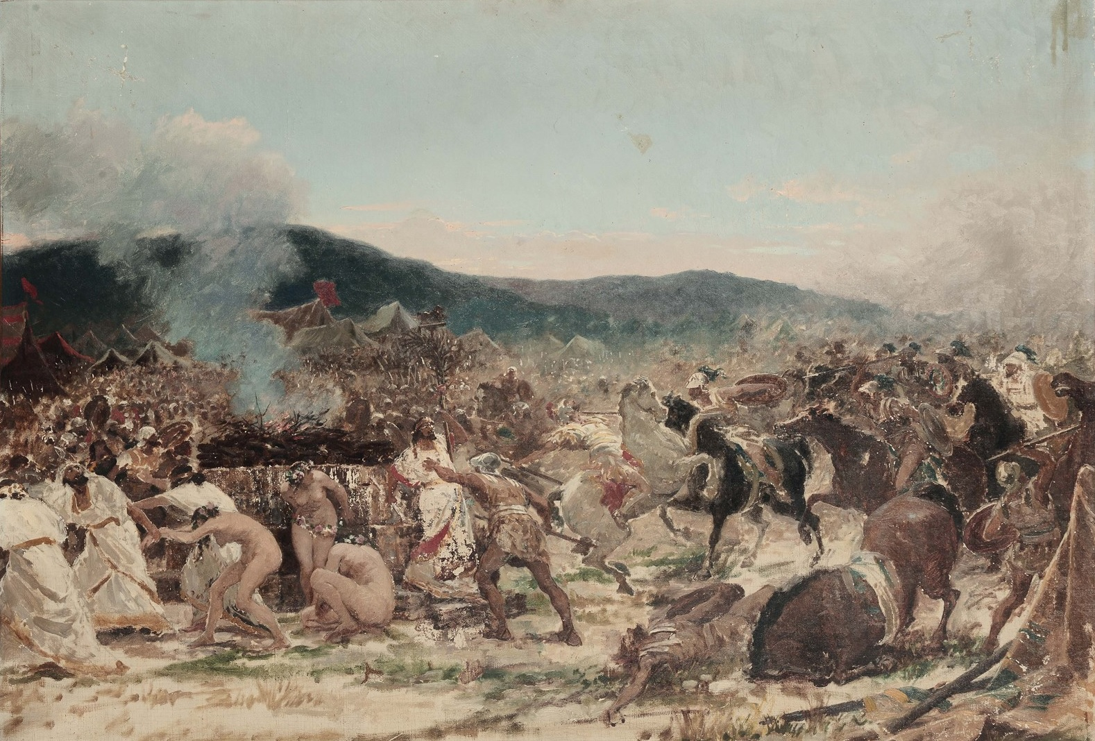 The Battle of Himera